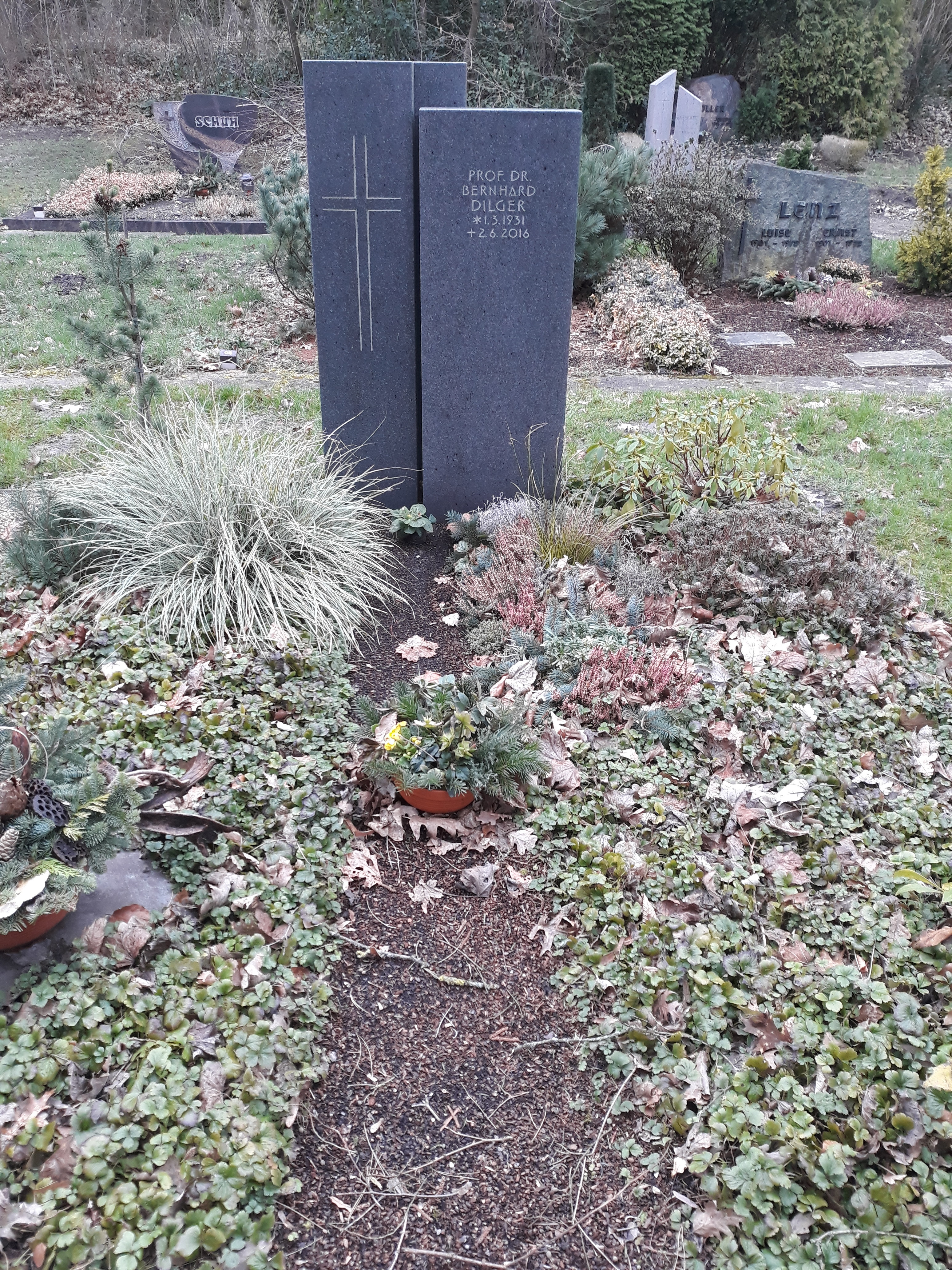 Das Grab des deutschen Erziehungswissenschaftlers Bernhard Dilger auf dem Friedhof Querenburg in Bochum.